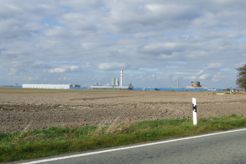 Industrial park near Arneburg